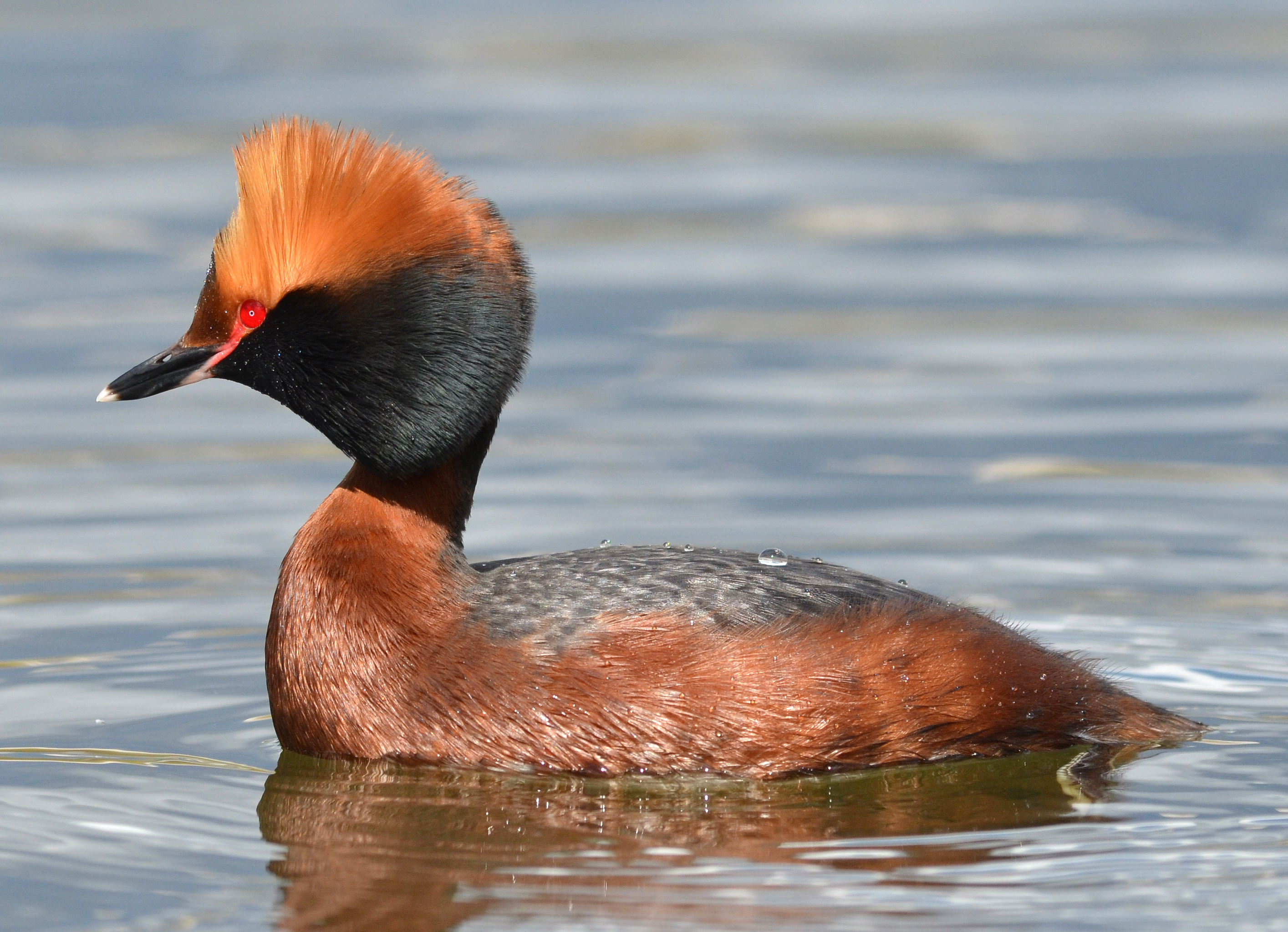 slavonian grebe